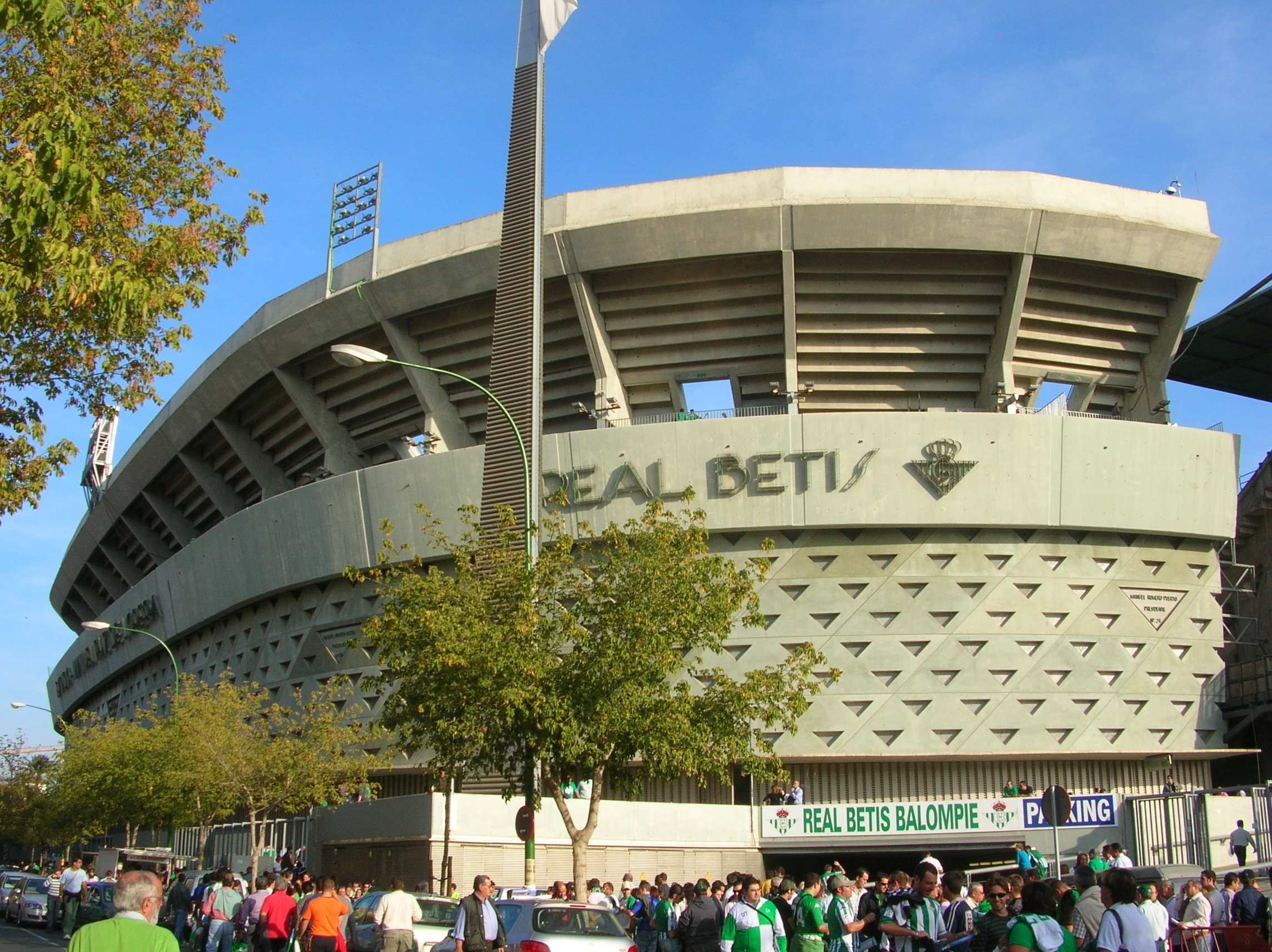 Stade Manuel Ruiz de Lopera (Séville)